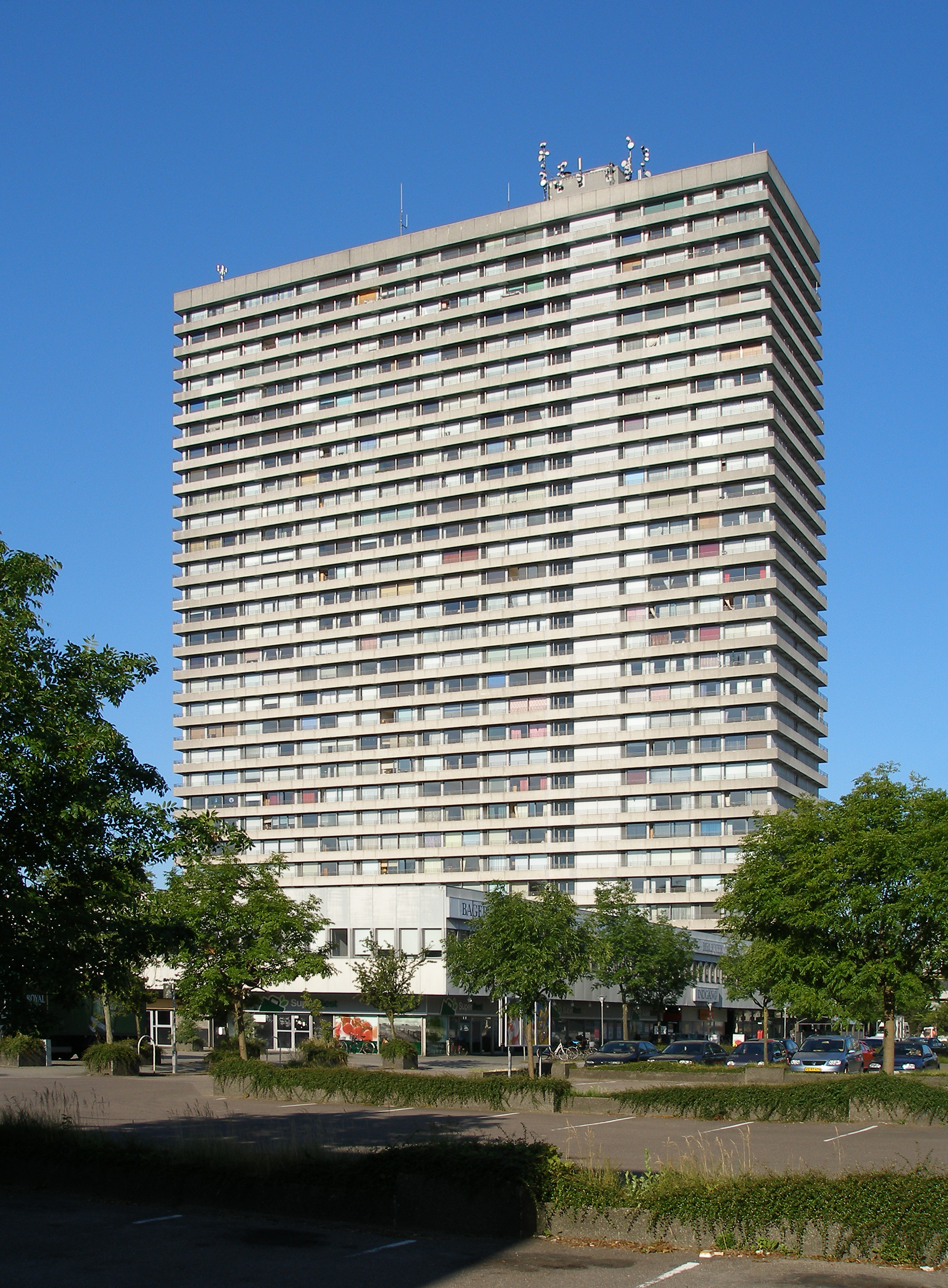 Domus Vista, Nordens Plads, Frederiksberg, Denmark